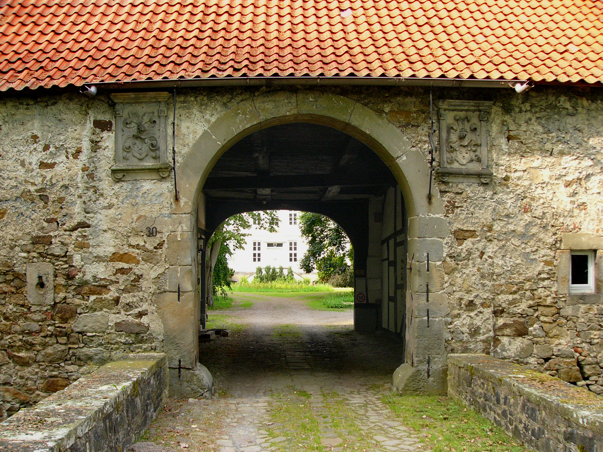 Eingang zum Wasserschloss in Reelkirchen, Ortsteil von Blomberg, Germany